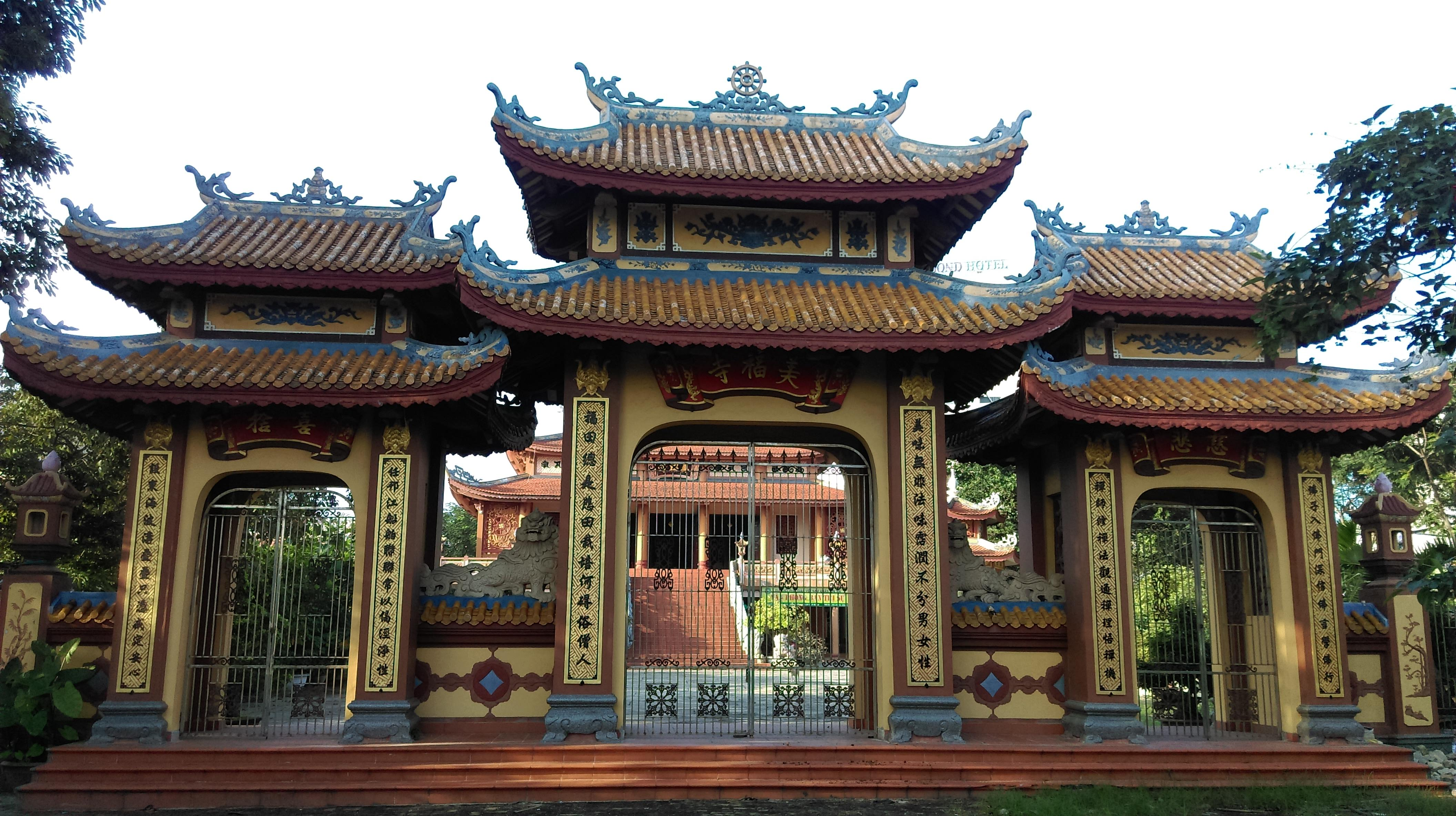 Chùa Mỹ Khê, Sơn Trà